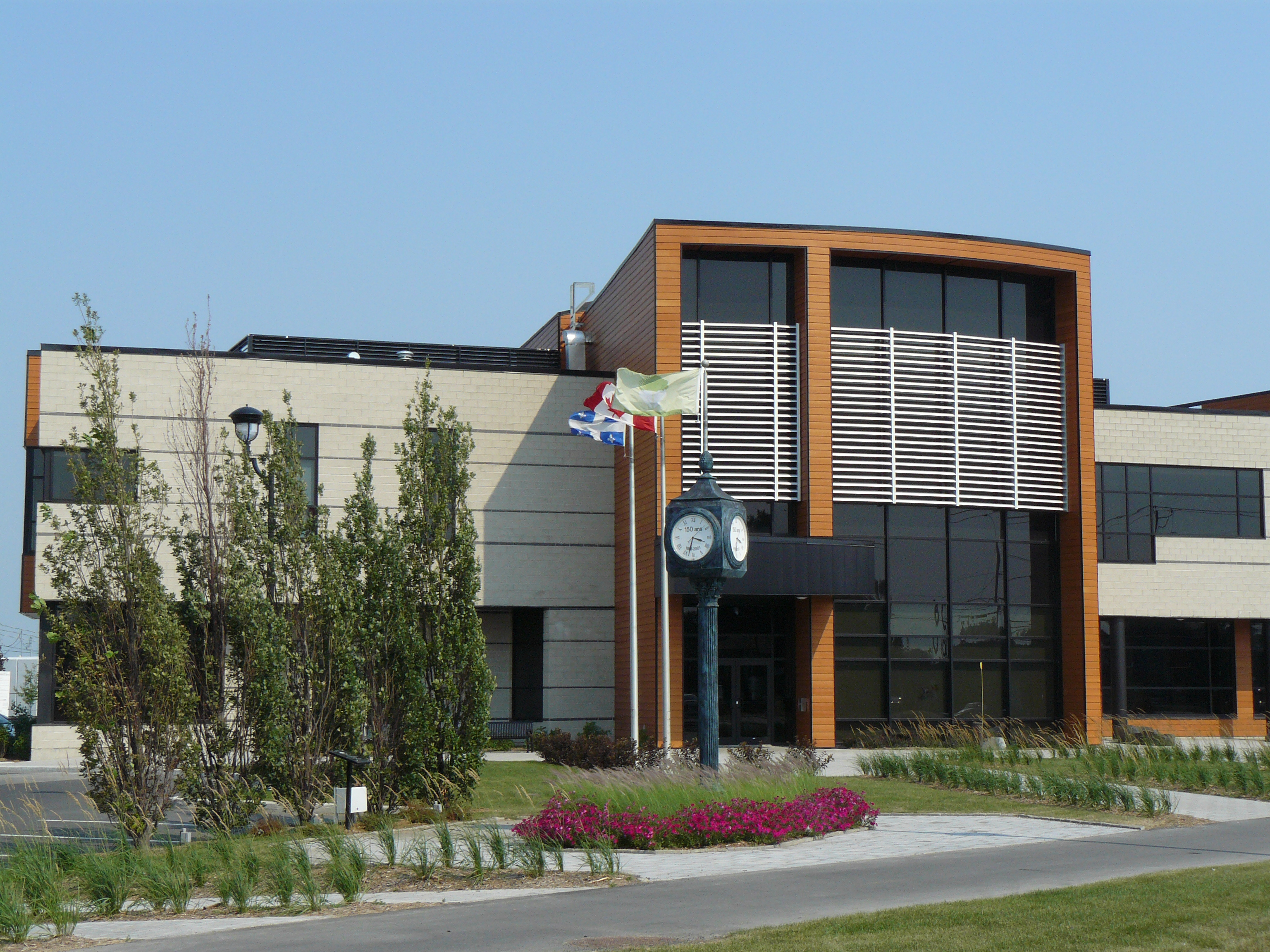 Bibliothèque municipale de Sainte-Julie